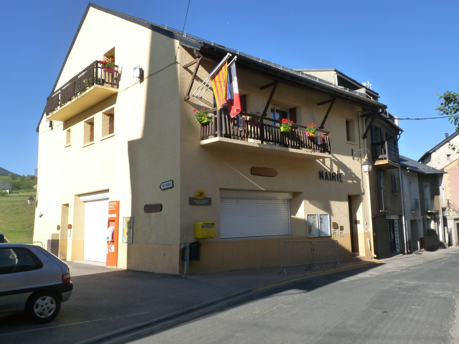 Mairie de La Cabanasse, Pyrénées-Orientales, France